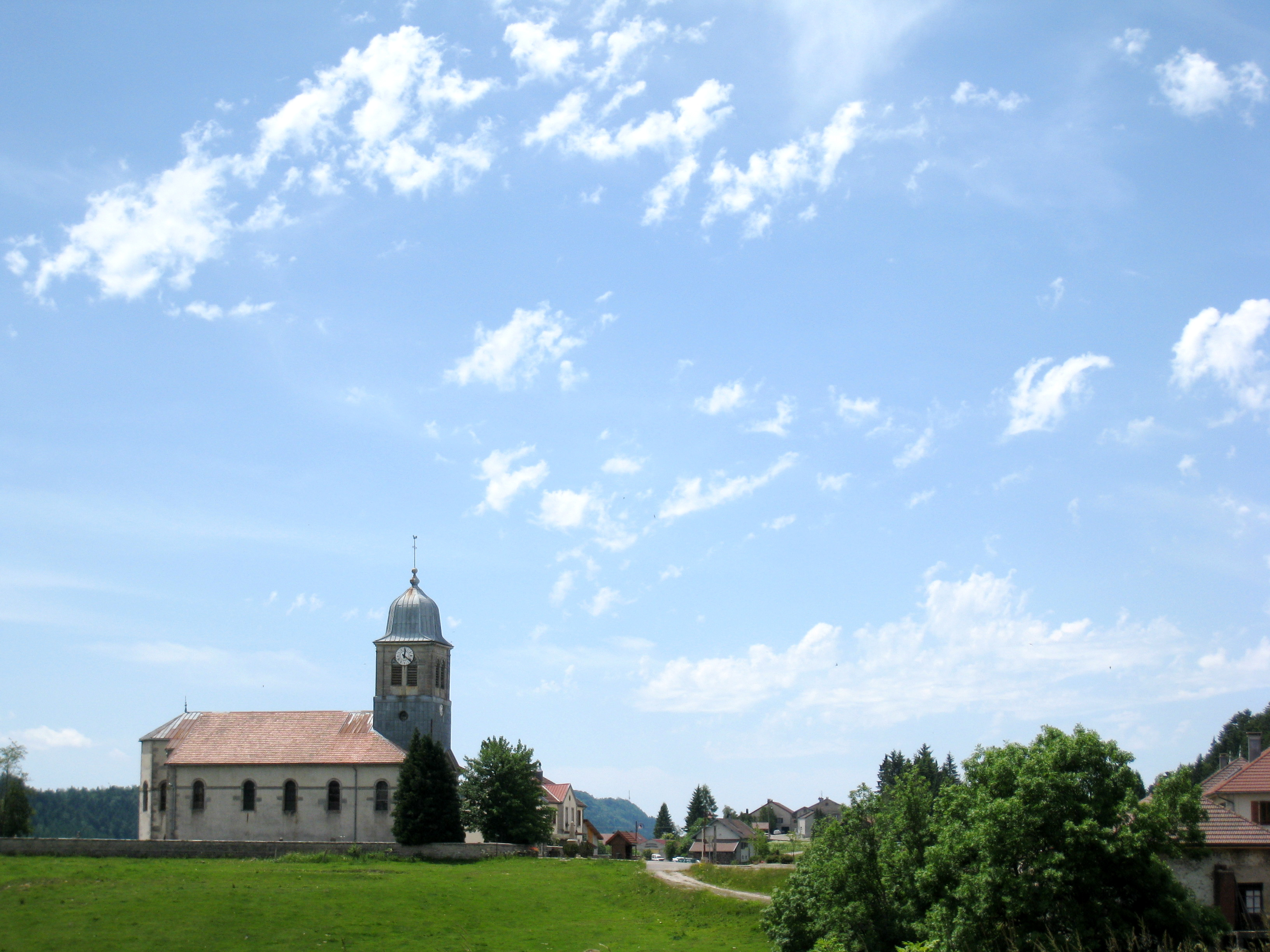 Eglise de Prénovel, Jura, France